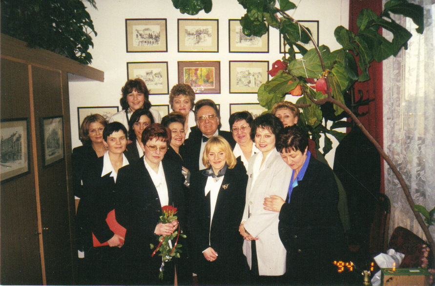 Roman Tokarczyk wśród absolwentów WPiA UMCS